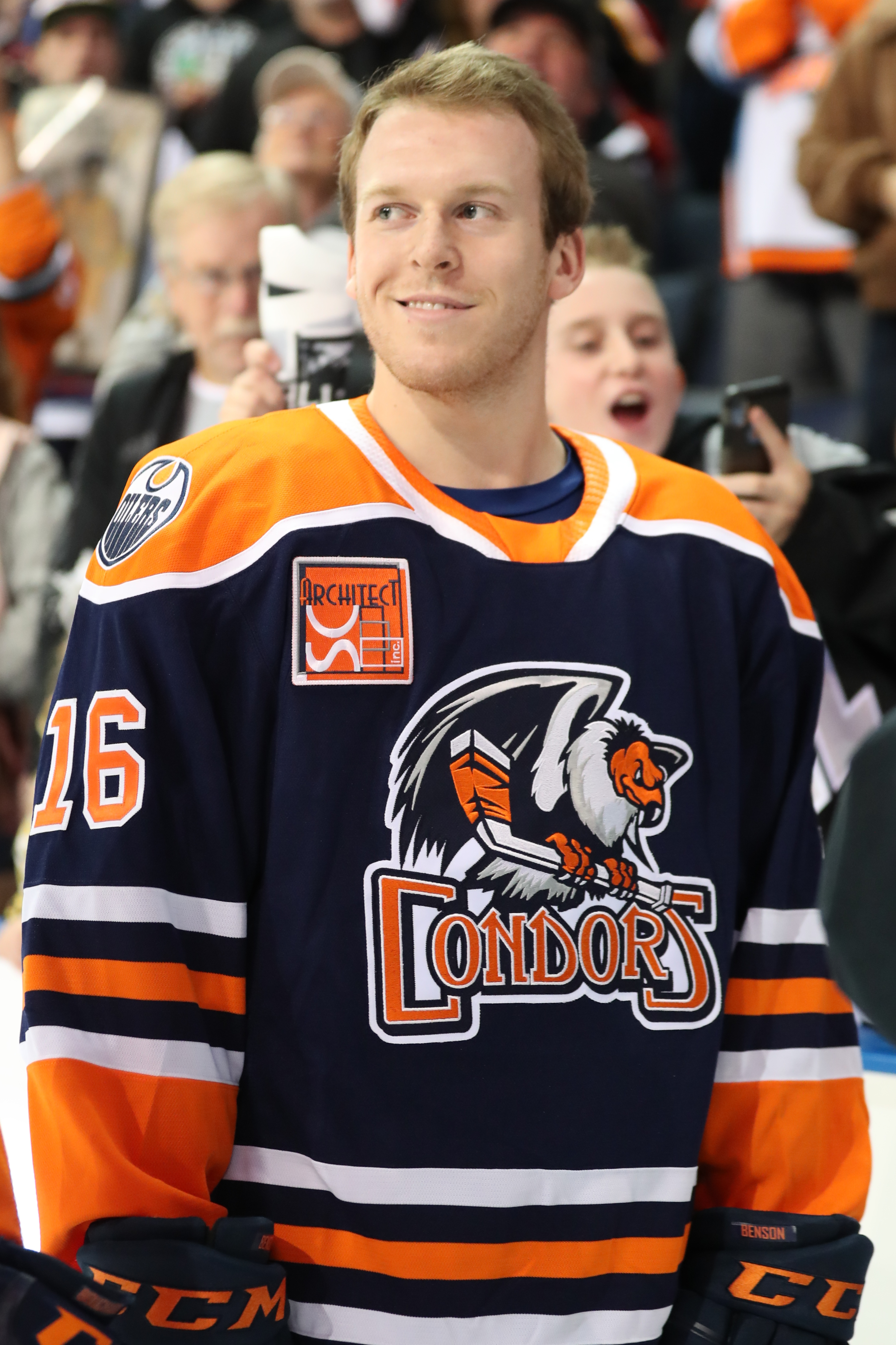 AA3I0829